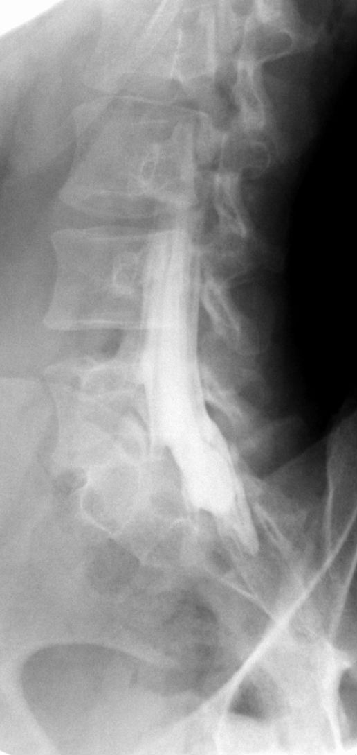 Myelographie konventionell in schräger Projektion. Man erkennt die einzelnen Wurzeltaschen.